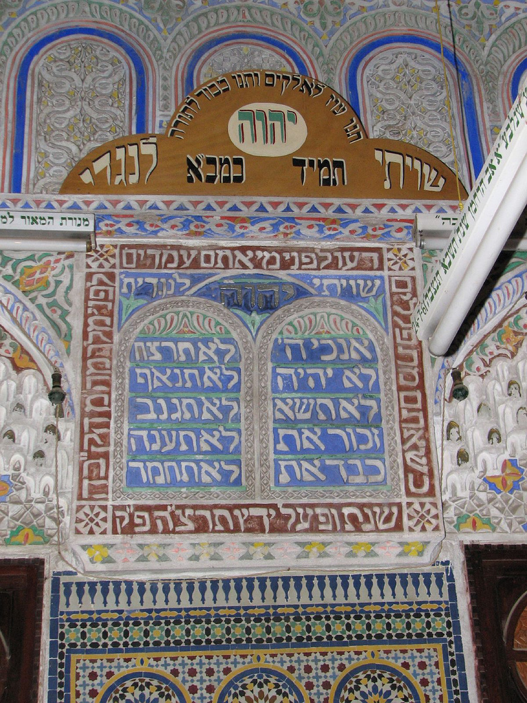 בית הכנסת בספרו, מרוקו שוויתי יהוה תמיד בכסא לנגדי